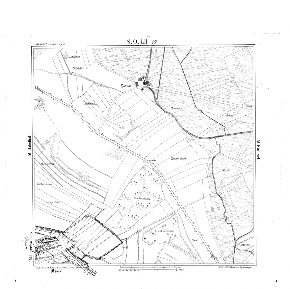 Deutschland (D) - Baden-Württemberg (BW) - Landkreis Sigmaringen (SIG): Kartenblatt SO LII 19 von 1845 Archivaliensignatur: Landesarchiv Baden-Württemberg Abt. Staatsarchiv Ludwigsburg Kartenausschnitt: Quadrant SO (südöstlich von Tübingen), Schicht SO LII, Planquadrat SO LII 19 (SO 52 19) Identifikator: EL 68 VI Nr 12699 Maße: 55 x 55 cm (Höhe x Breite) Online-Findbuch im Angebot des Archivs